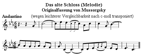 Beschreibung: Thema aus "il vecchio castello" von Modest Mussorgsky Quelle: Selbst erstellt Fotograf / Zeichner: Boris Fernbacher 19:32, 1. Apr 2005 (CEST) Andere Versionen